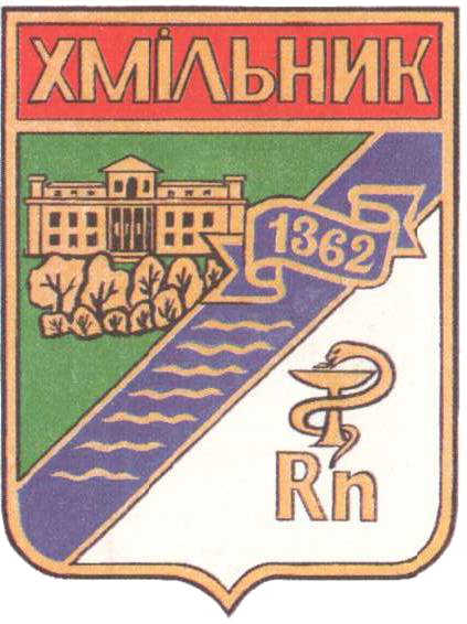 Герб Хмільника 1987 року